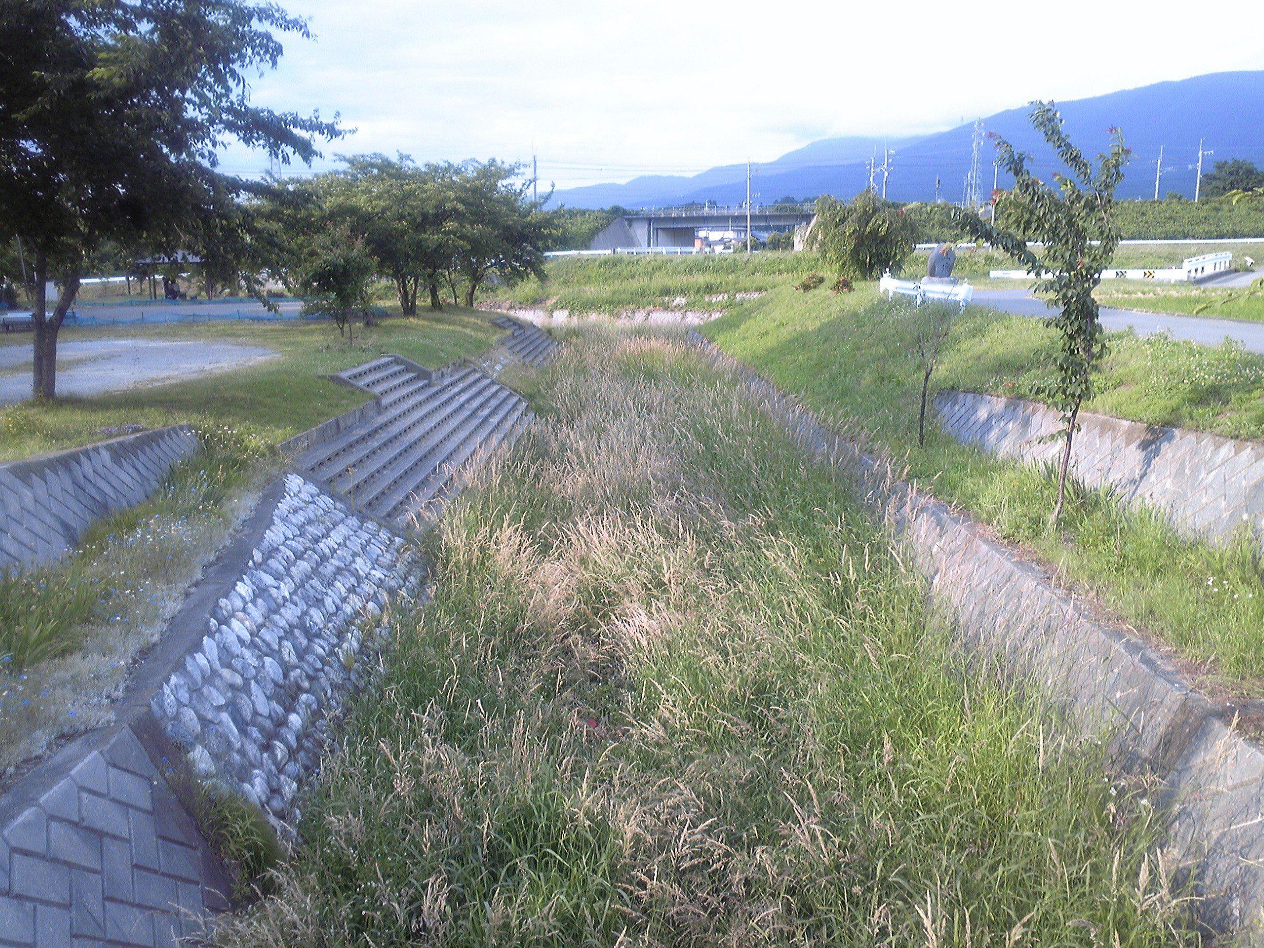 矢沢川。長野県塩尻市大字下西条、下西条宗張橋（しもにしじょうむなはりはし）より下流方向。